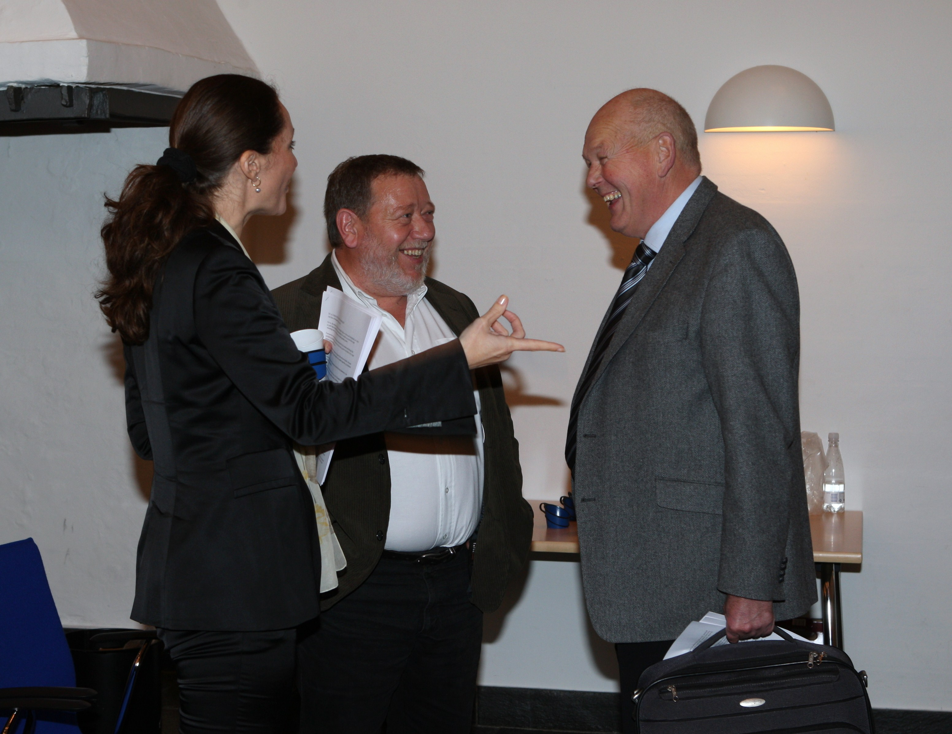 Journalist Paula Larrain, Formand for Søværnets Konstabelforening Bjarne Krogh-Pedersen og Folketingsmedlem Jens Chr. Lund i samtale. November 2008.